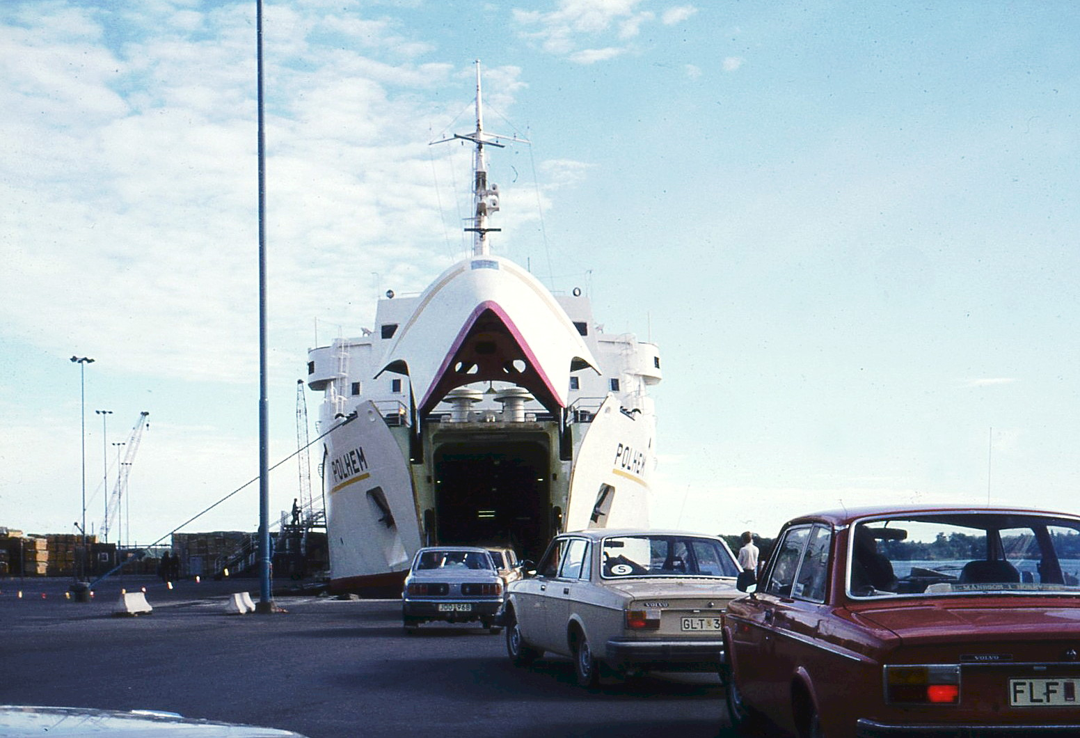 M/S Polhem (tidigare M/S Scania) i Västerviks hamn